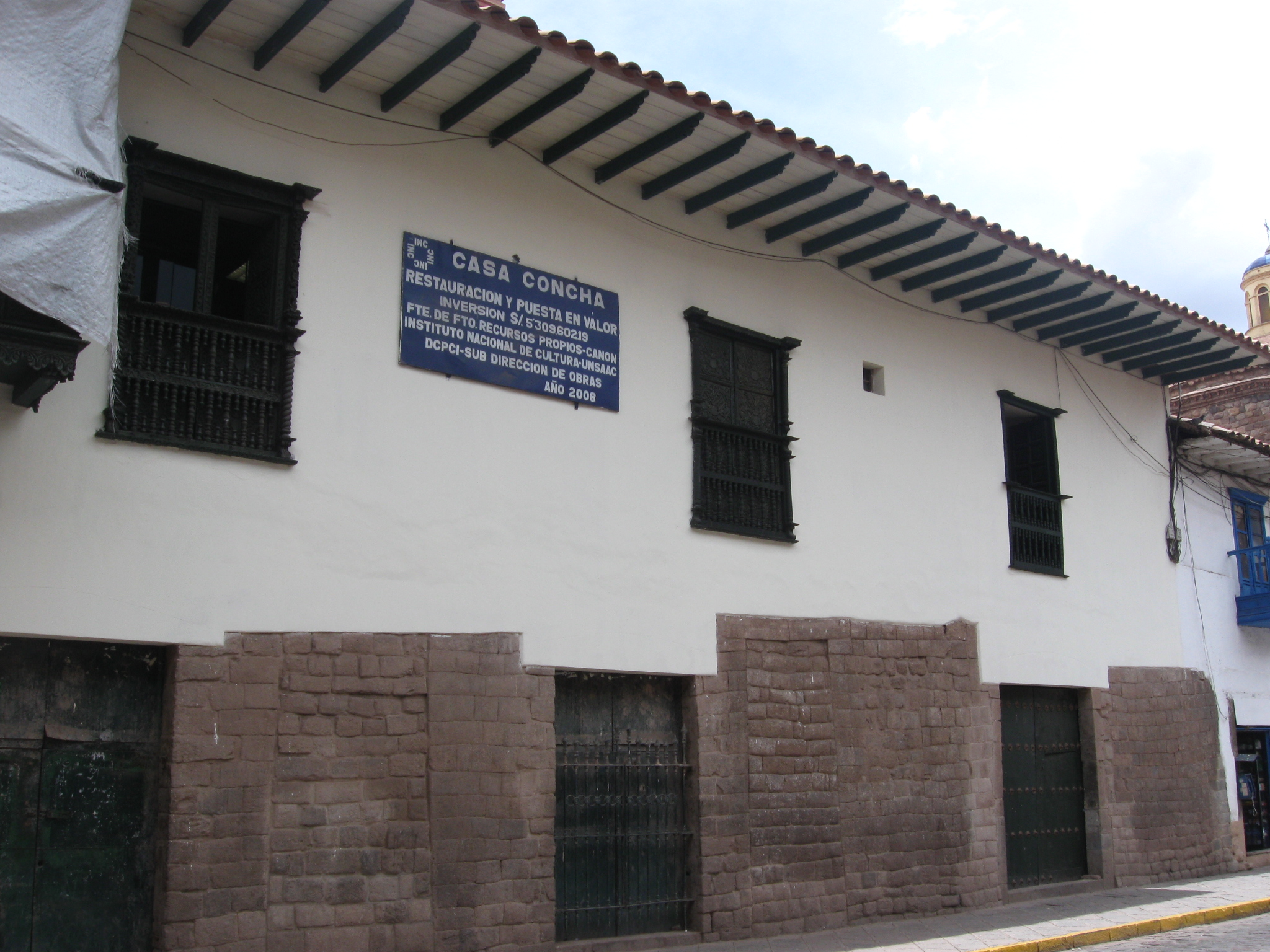 Vista parcial de los exteriores de la Casa Concha durante su restauración, año 2010